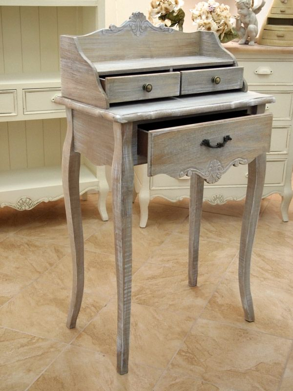 Przepiękny sekretarzyk, kolekcja rustykalna, Shabby Chic. Nadstawka, trzy szufladki.